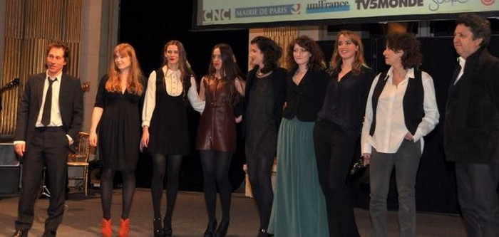 L'équipe du film L'Apollonide à la cérémonie des Prix Lumières. De gauche à droite : Bertrand Bonello, Iliana Zabeth, Pauline Jacquard, Maïa Sandoz, Judith Lou Lévy, Alice Barnole, Adèle Haenel, Noémie Lvovsky, X